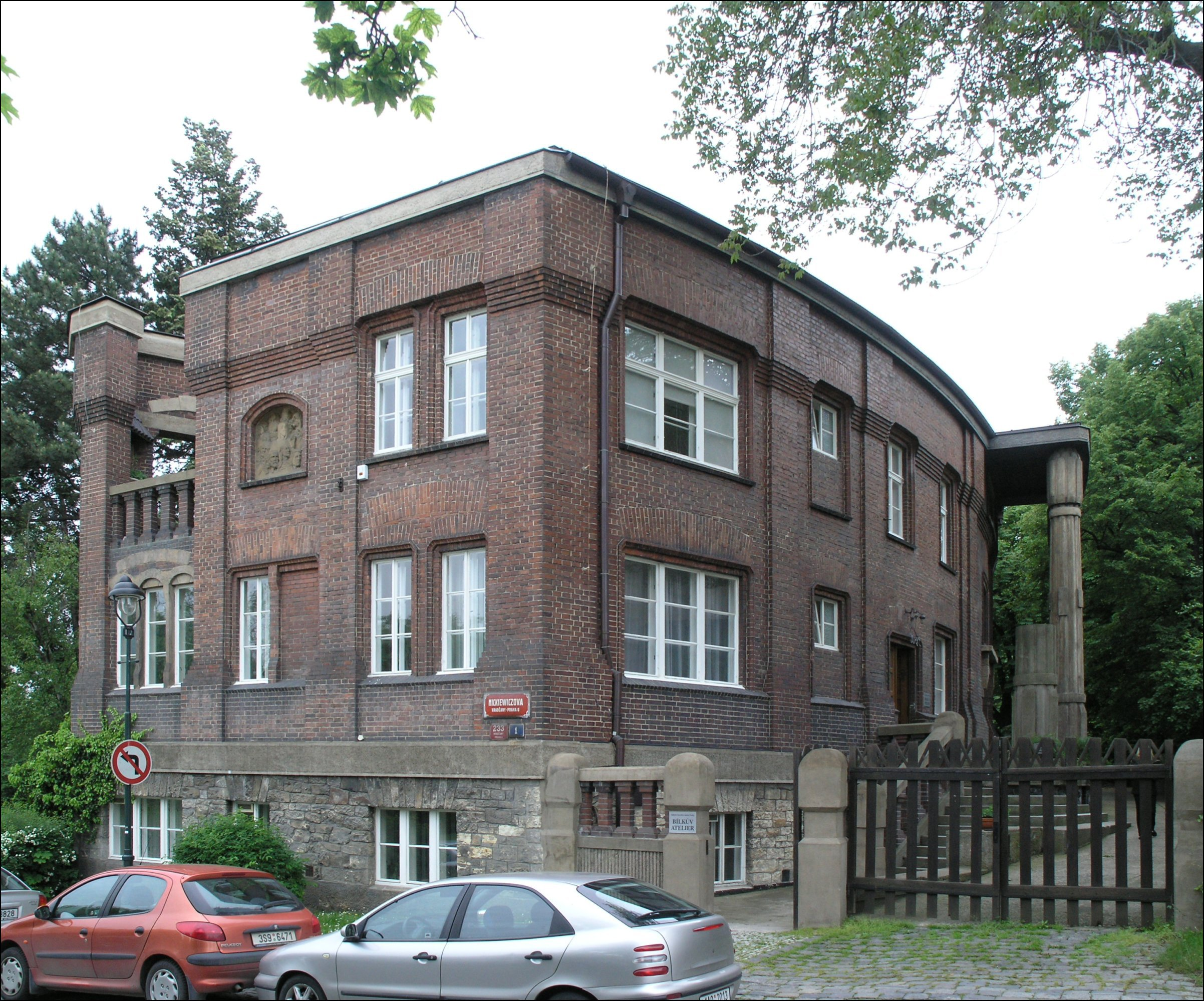 Bílkova vila